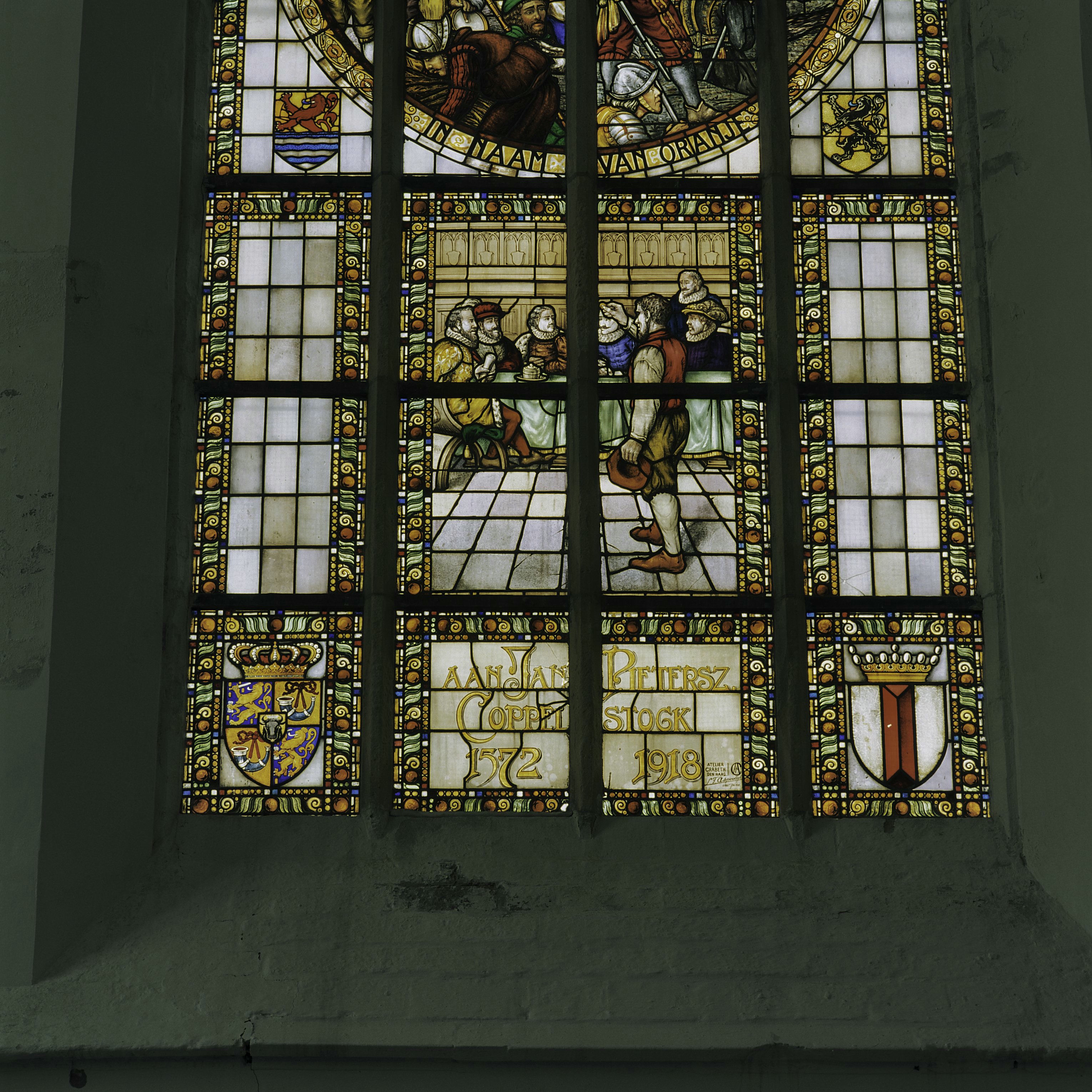 Grote- of Sint Catharijnekerk: Interieur, detail glas-in-loodraam in de westgevel van de zuiderzijbeuk (Jan Pieterz. Coppelstock) (opmerking: Boek: "66 Kanjermonumenten")